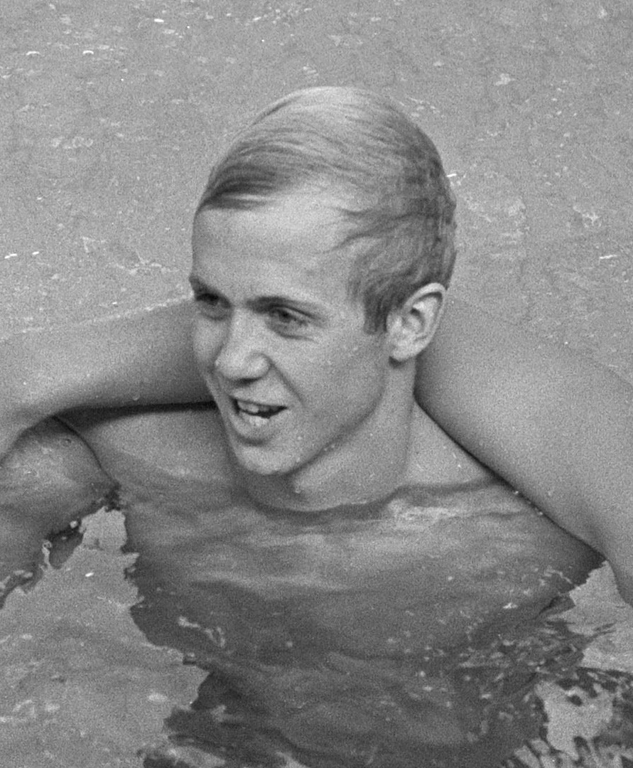 Eurovisie-zeslandenzwemtoernooi te Bussum, Anders Bellbring